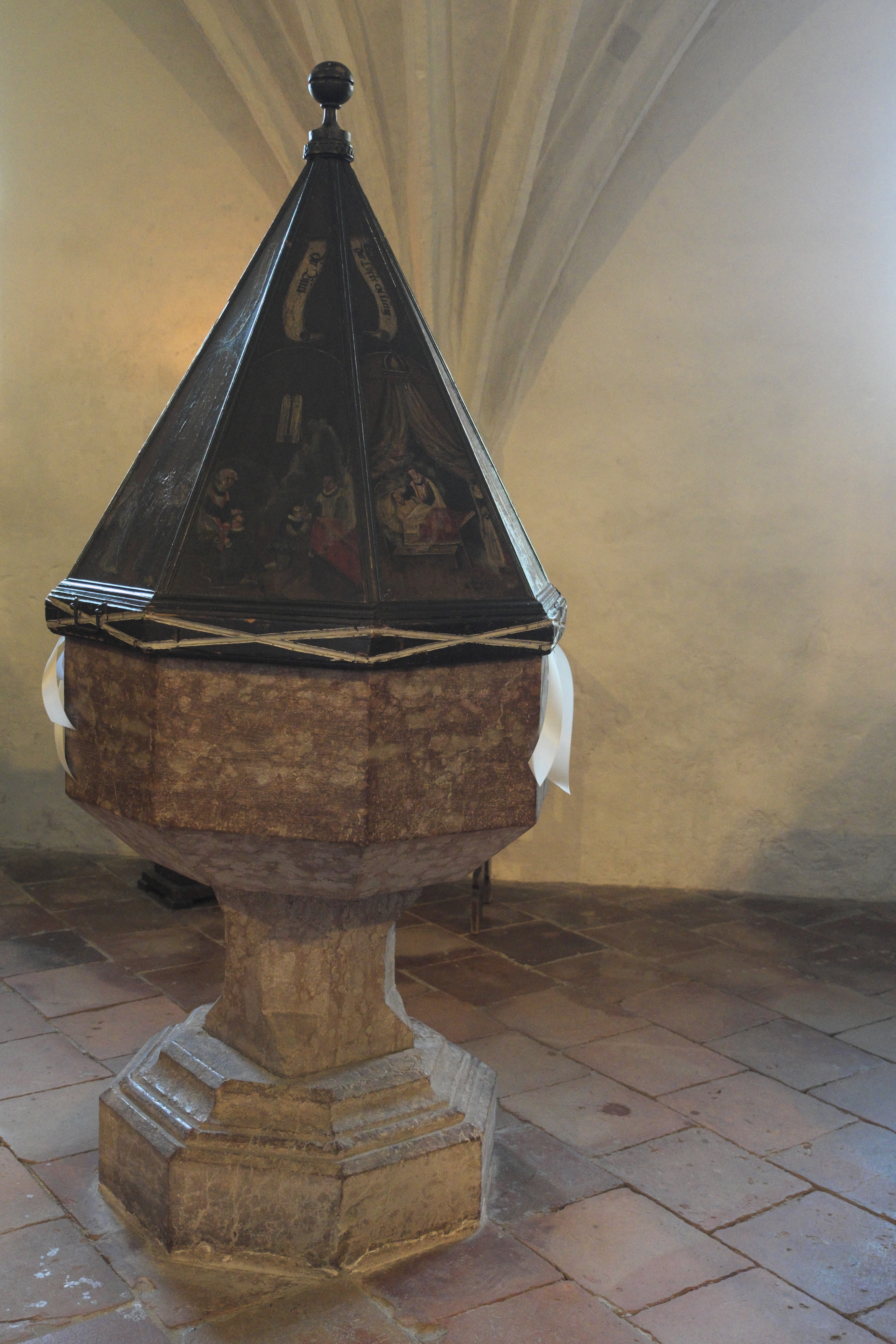 Katholische Abtei- und Kuratiekirche Mariä Opferung des Benediktinerinnenklosters Frauenchiemsee auf der Fraueninsel im Landkreis Rosenheim (Bayern/Deutschland), Taufbecken mit Deckel